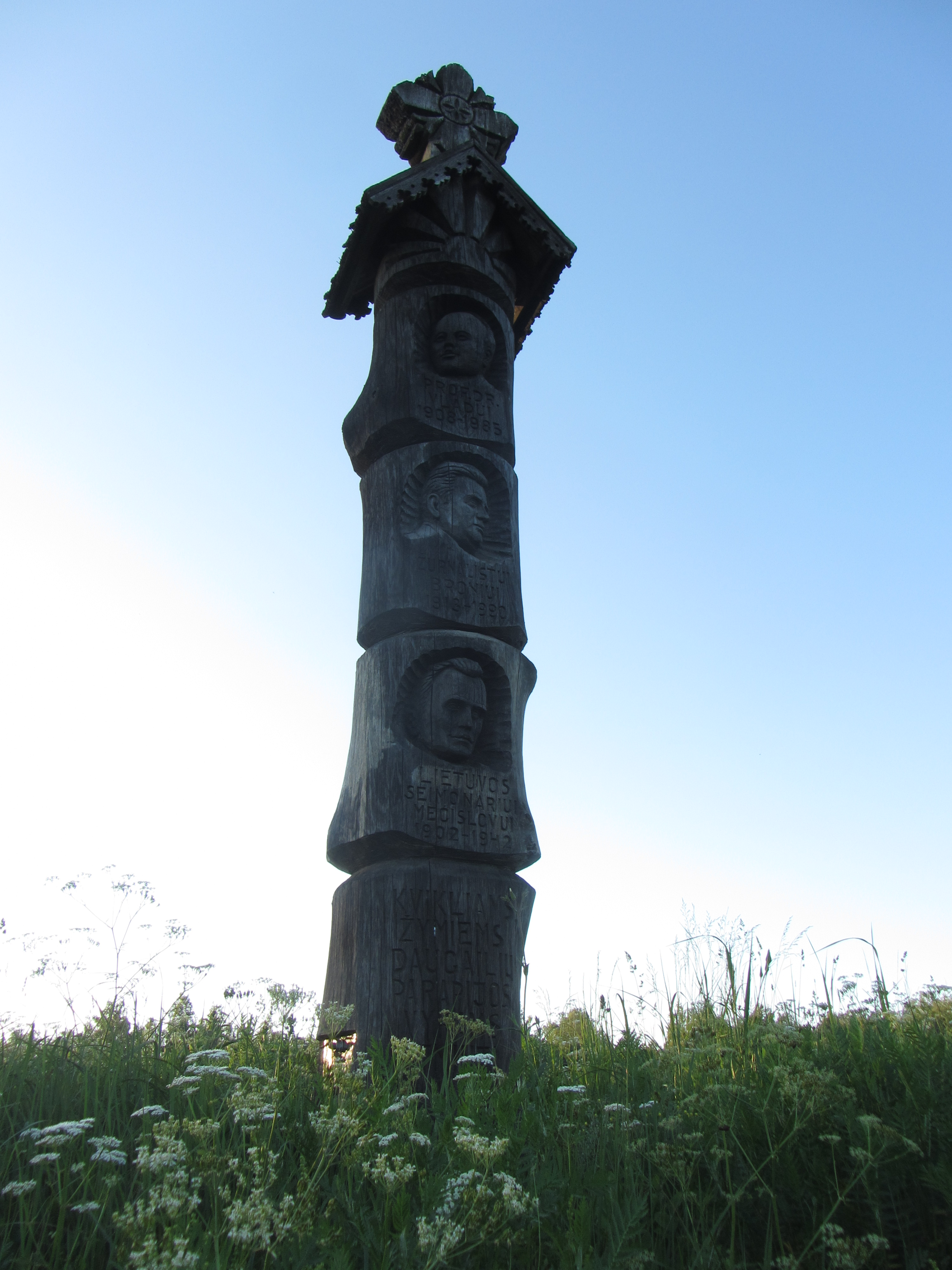 Degučių sen., Lithuania